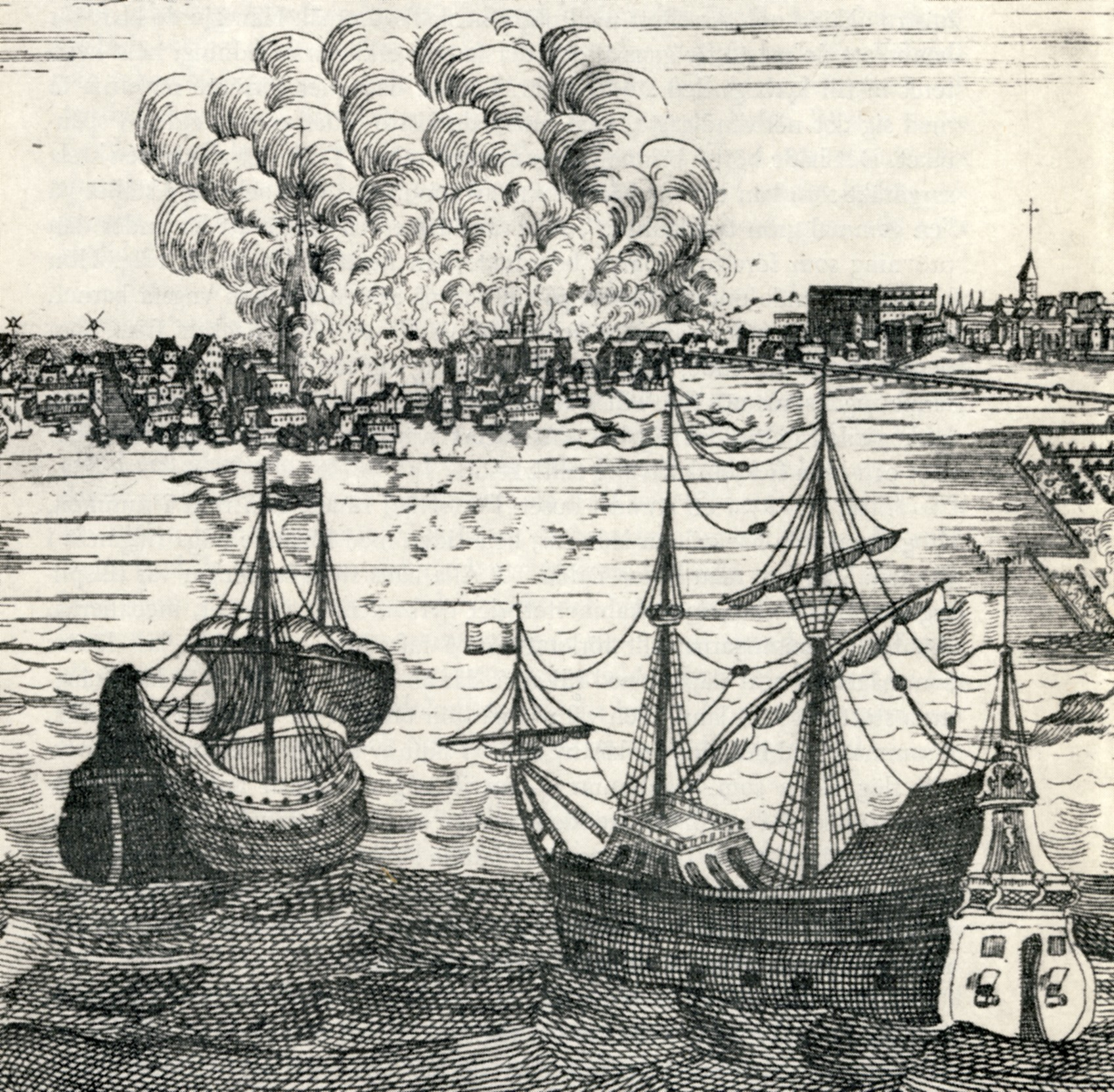 Klarabranden i Stockholm 1751, detalj